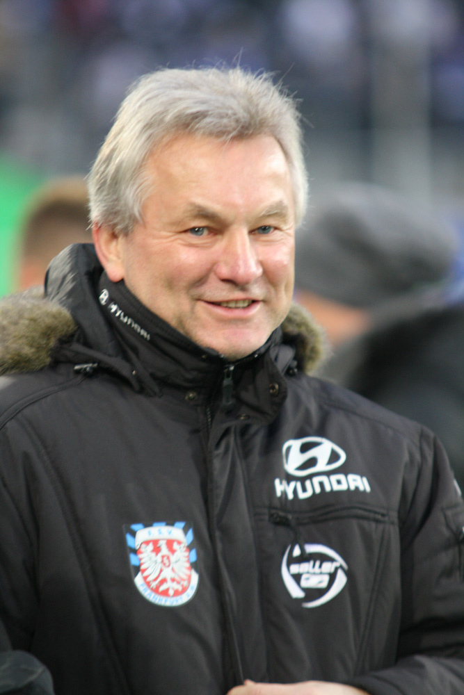 Benno Möhlmann, Trainer FSV Frankfurt